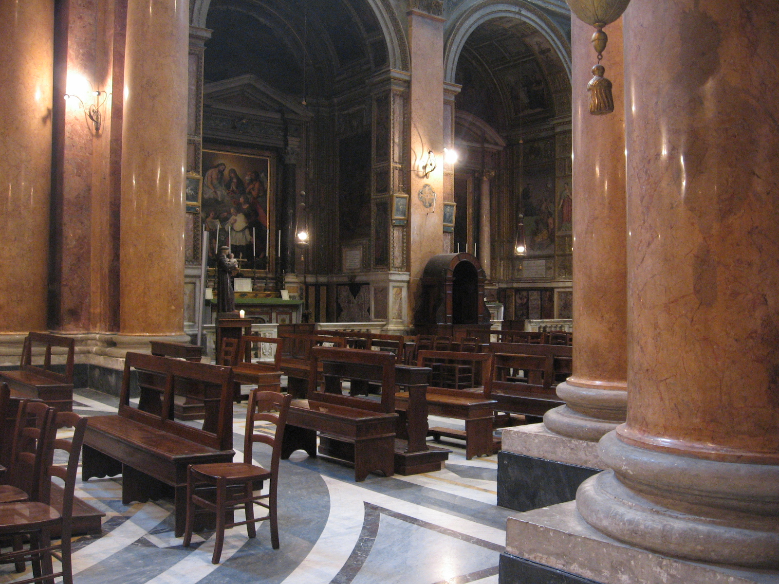 Church of Santissima Trinità sei Pellegrini, Rome - Interior